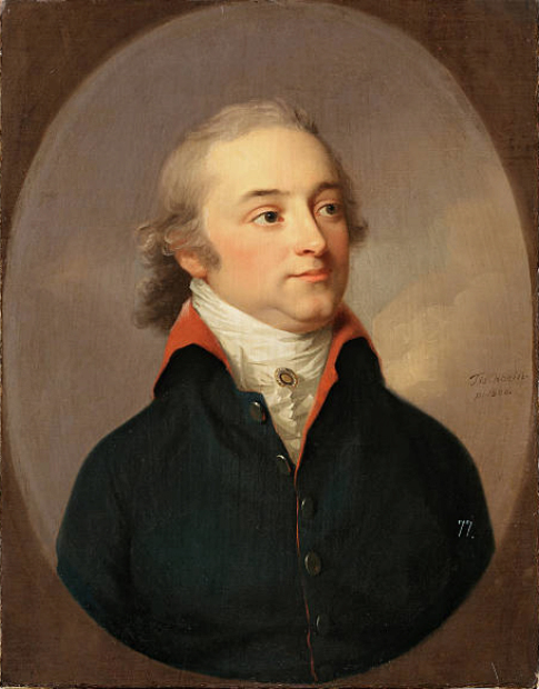 Голштейн-Бек Фридрих-Карл-Людвиг (1757-1816)